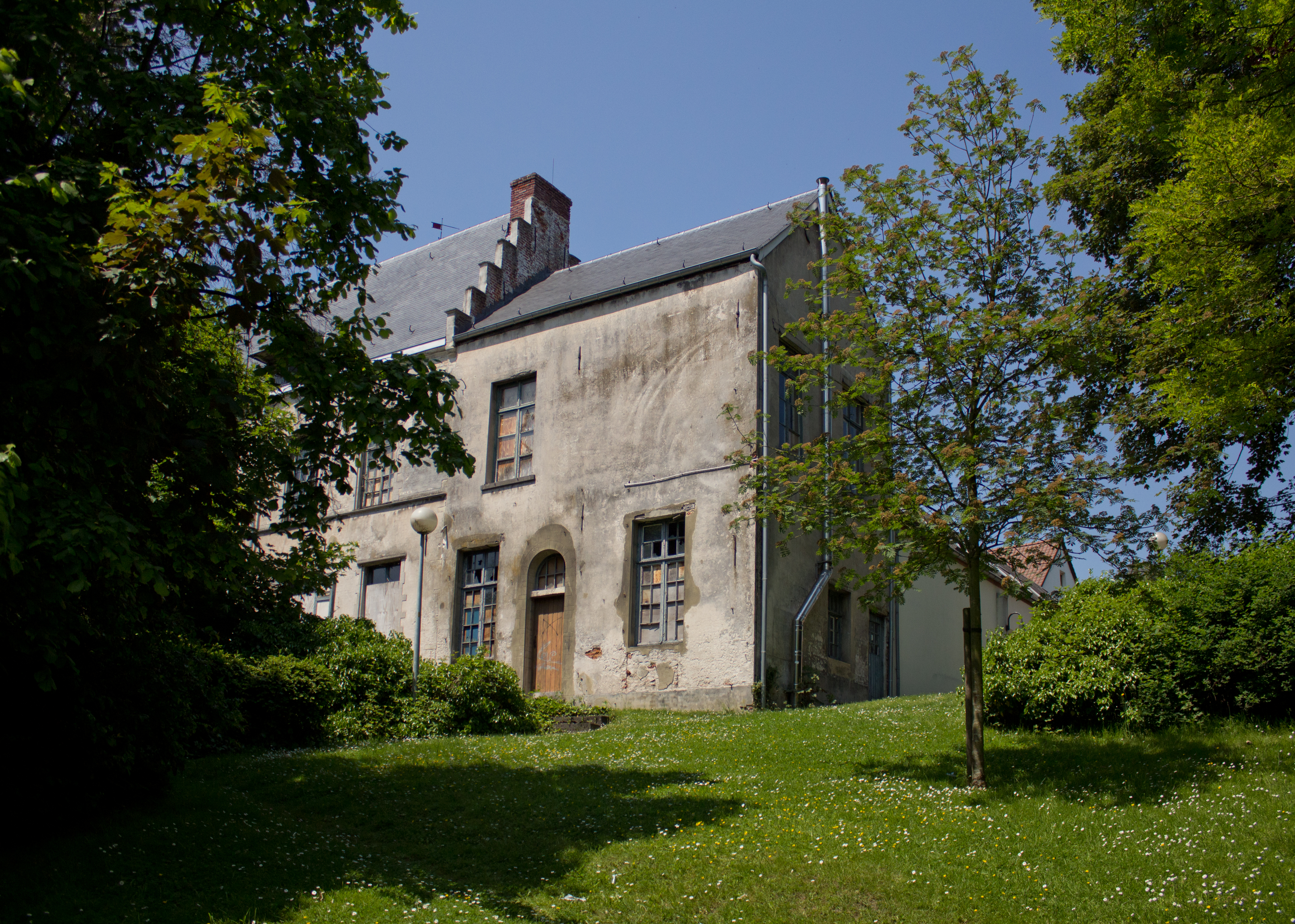 Het vervallen Justius Lipsiushuis, Overijse.